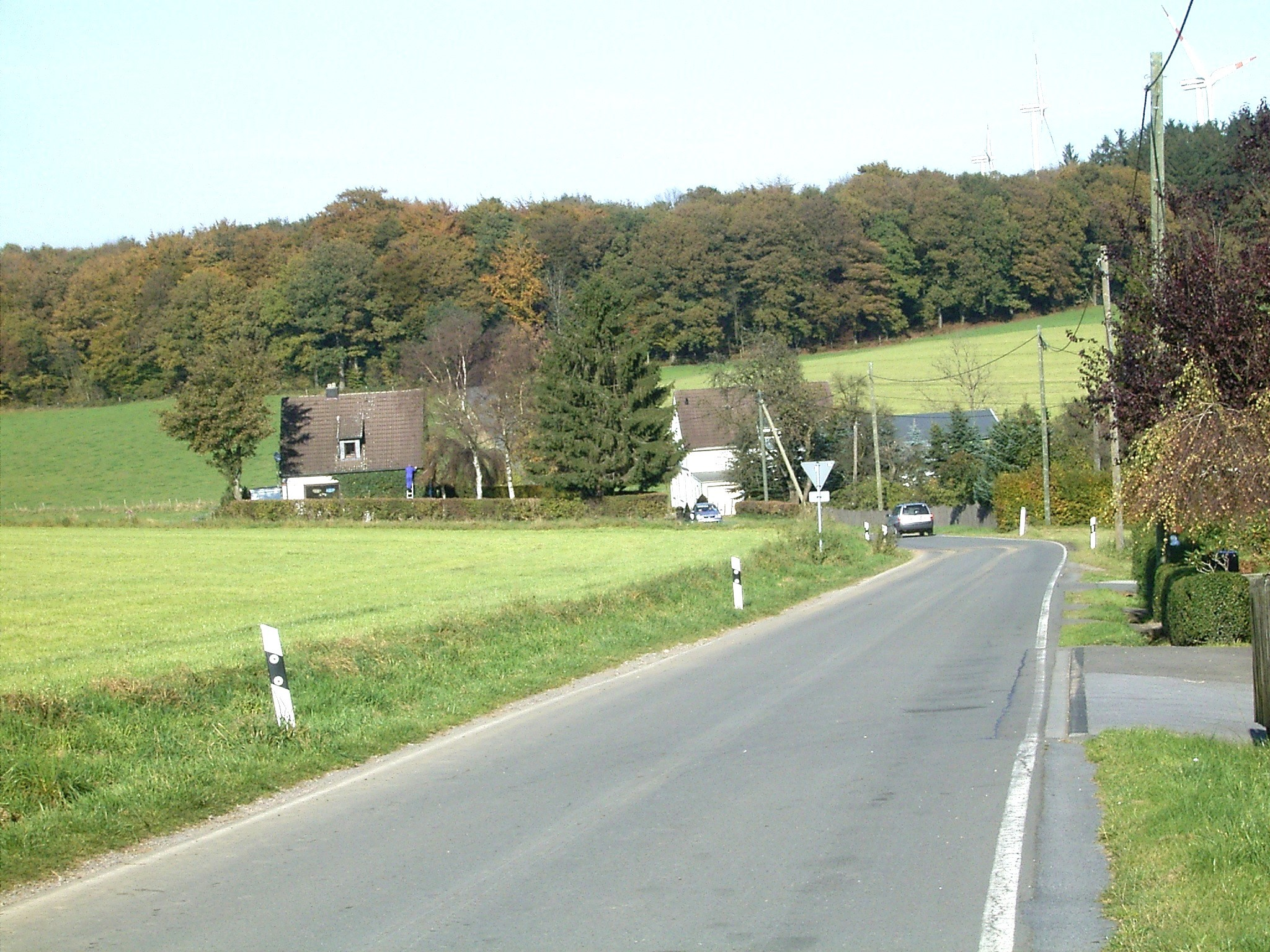 Radevormwald